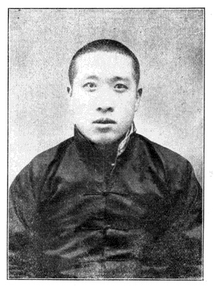 中華民國國會議員